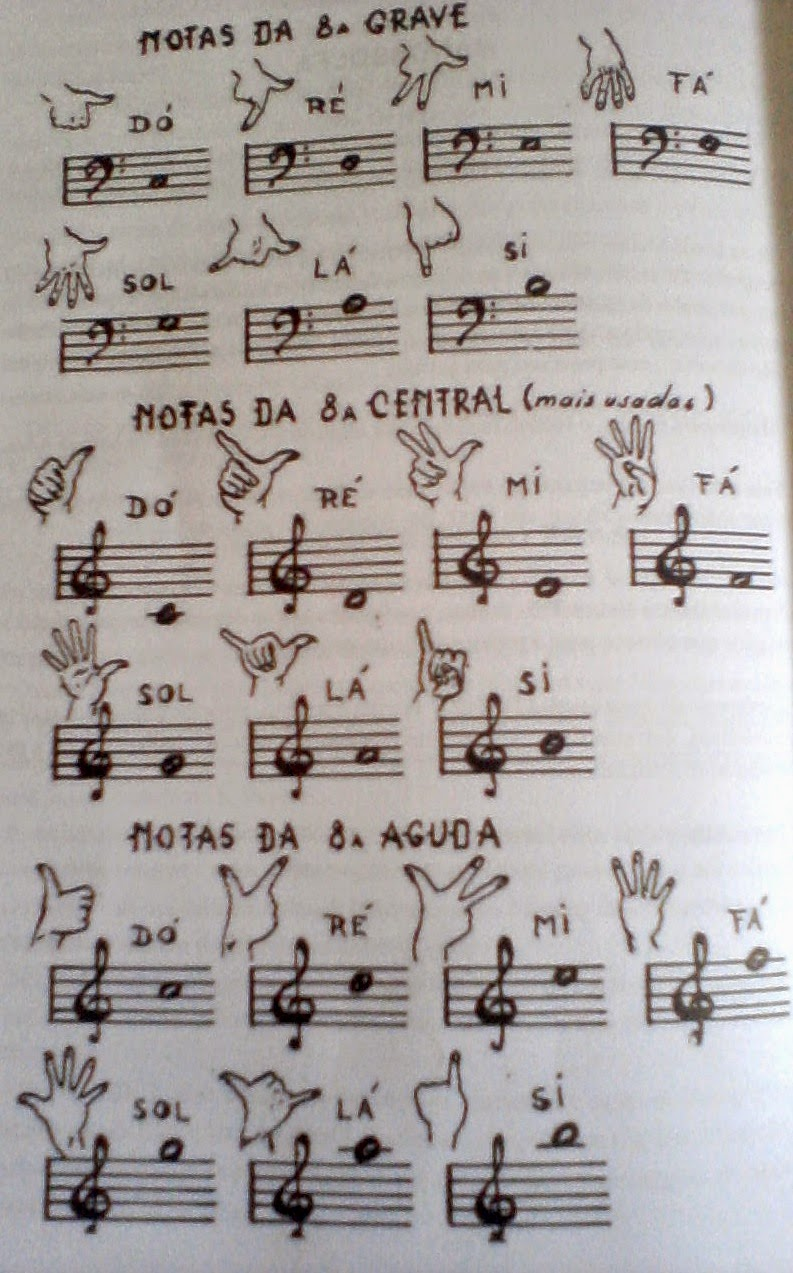 Imagem que indica os sinais correspondentes à cada um dos graus da escala na pedagogia de Villa-Lobos.